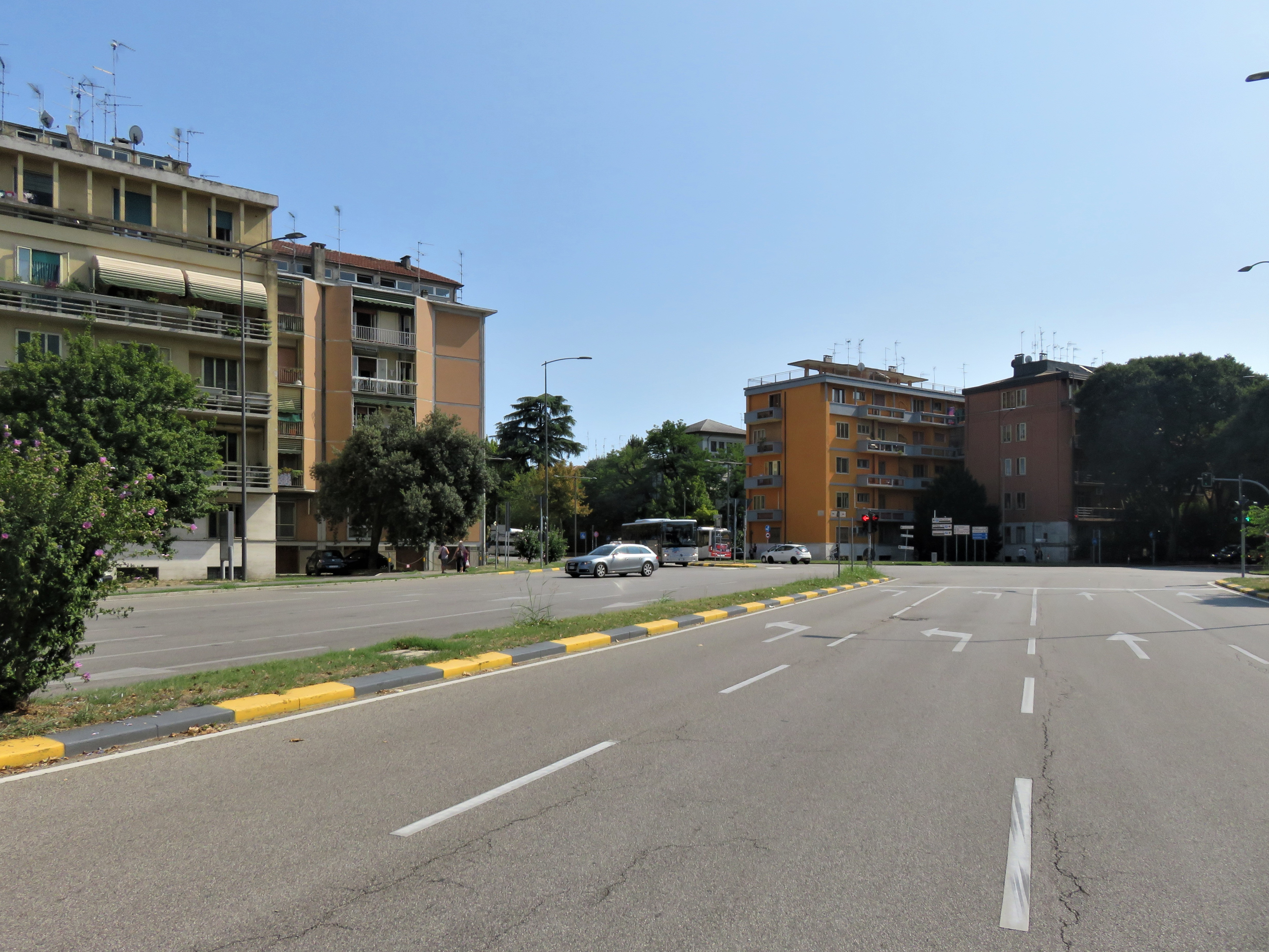 Zona Barriere a Ferrara. Grande incrocio stradale che dalla stazione porta verso corso Porta Po e viale Cavour